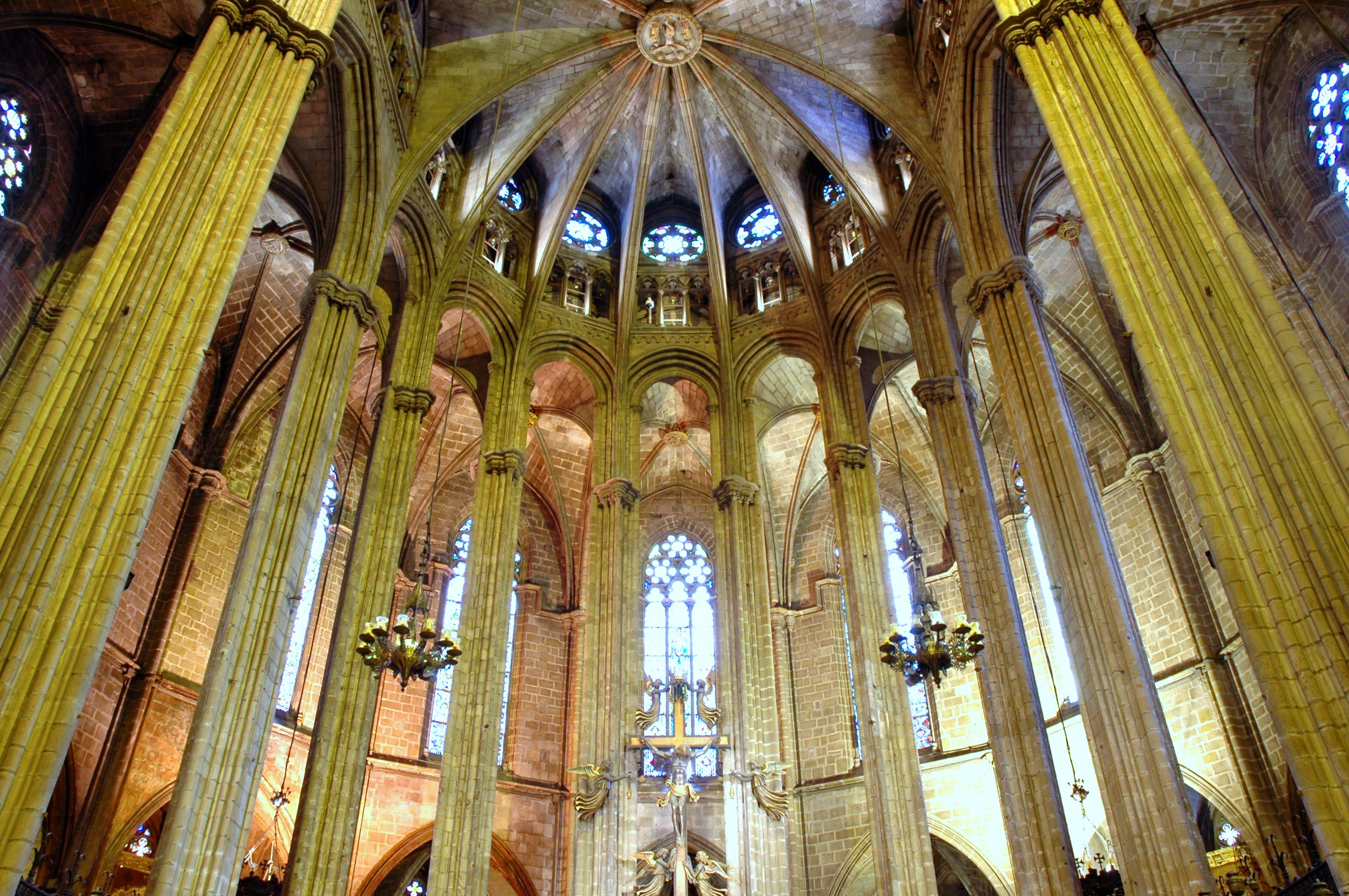 Catedral de Barcelona - Interior